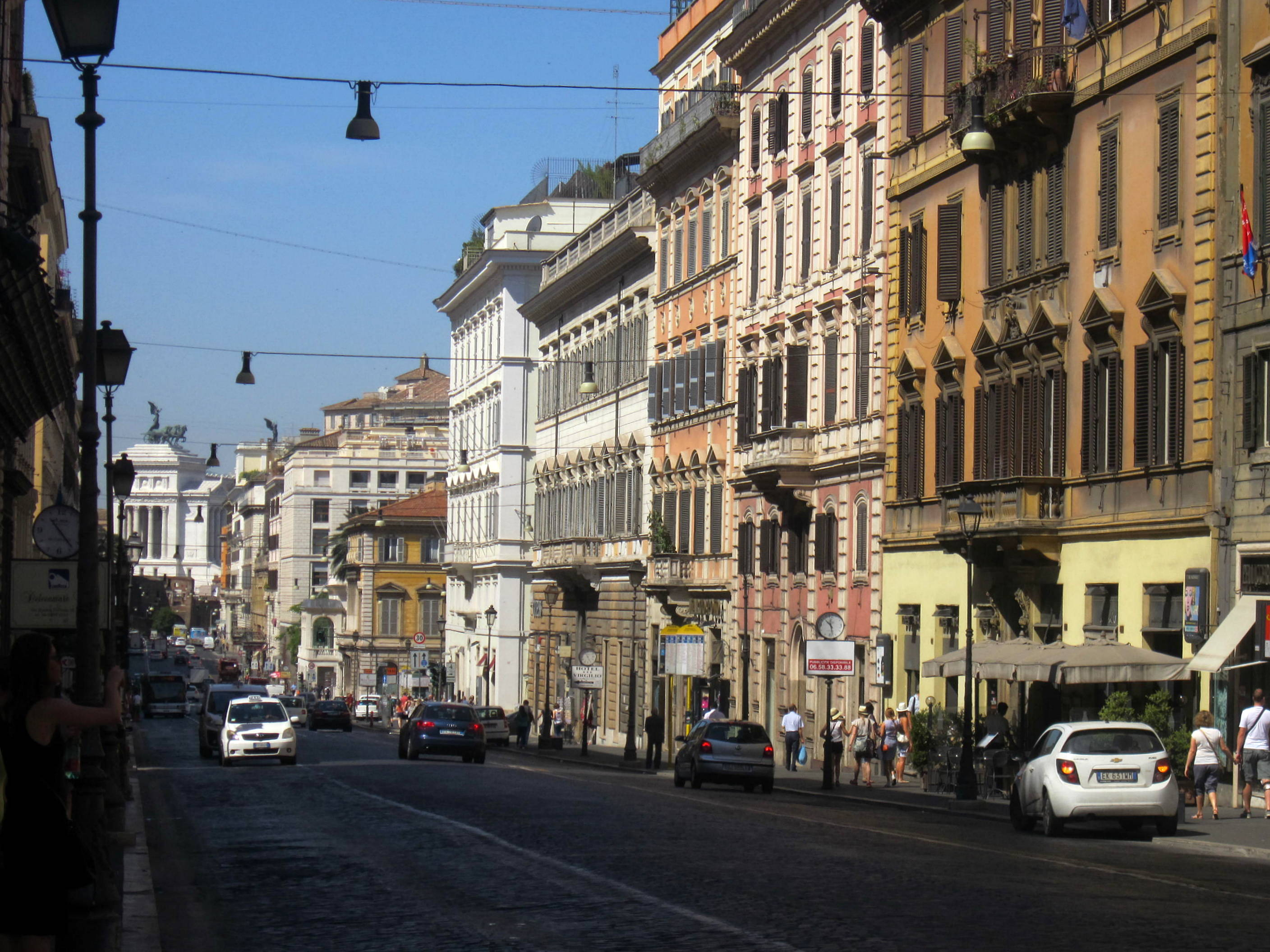 Veduta di Via Nazionale a Roma